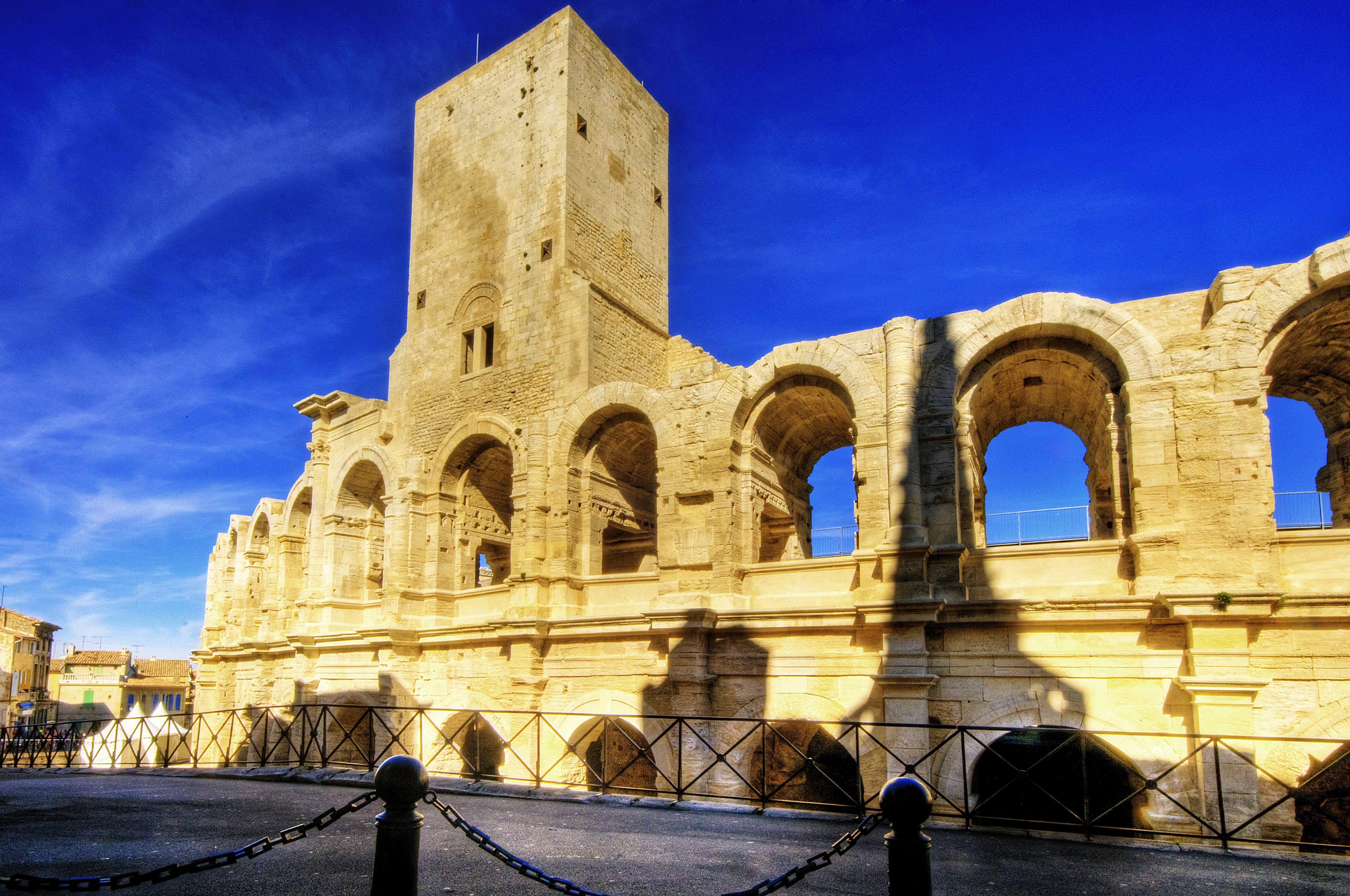 Arles